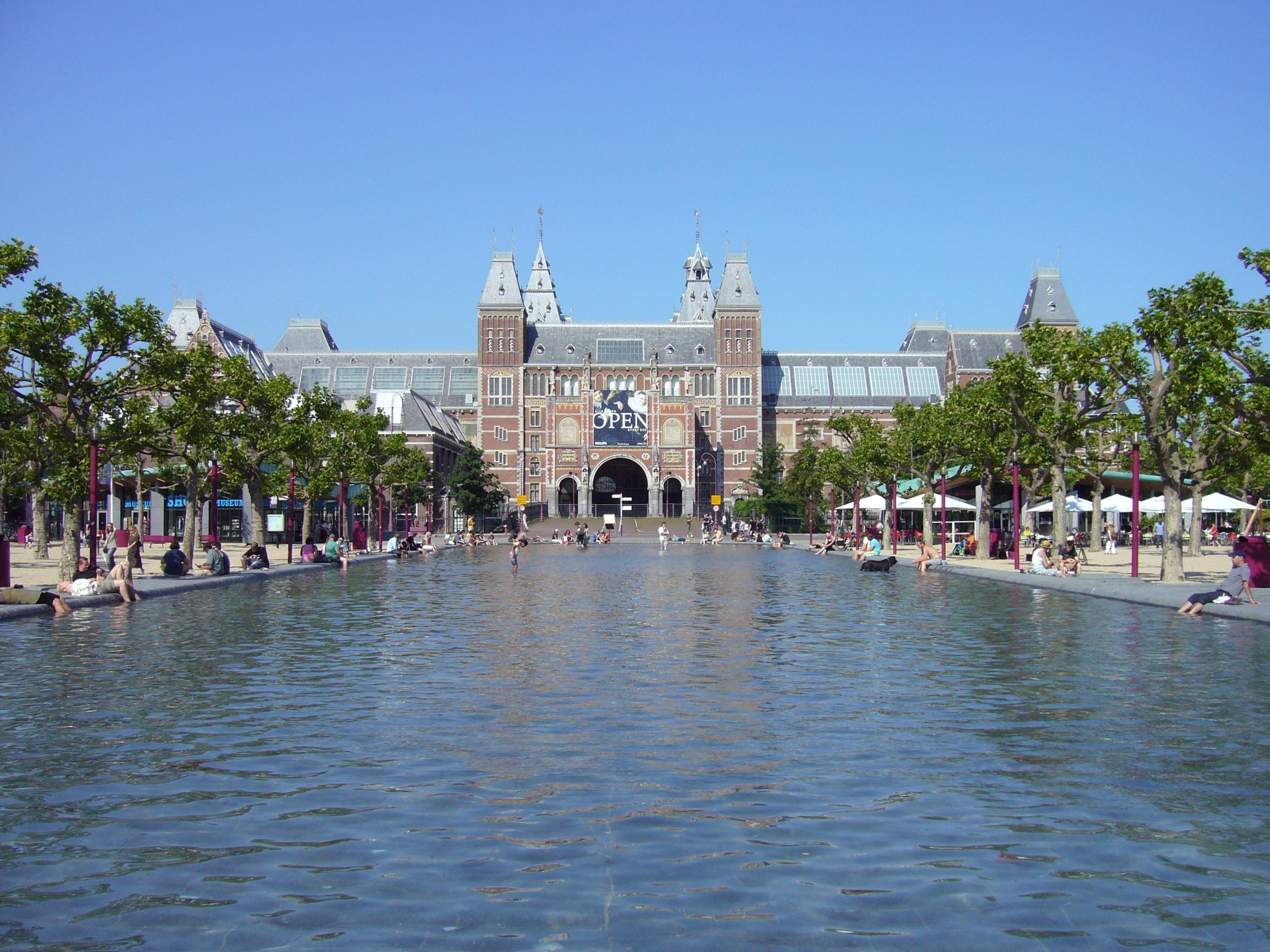 Vijver museumplein / Rijksmuseum Amsterdam summer of 2008